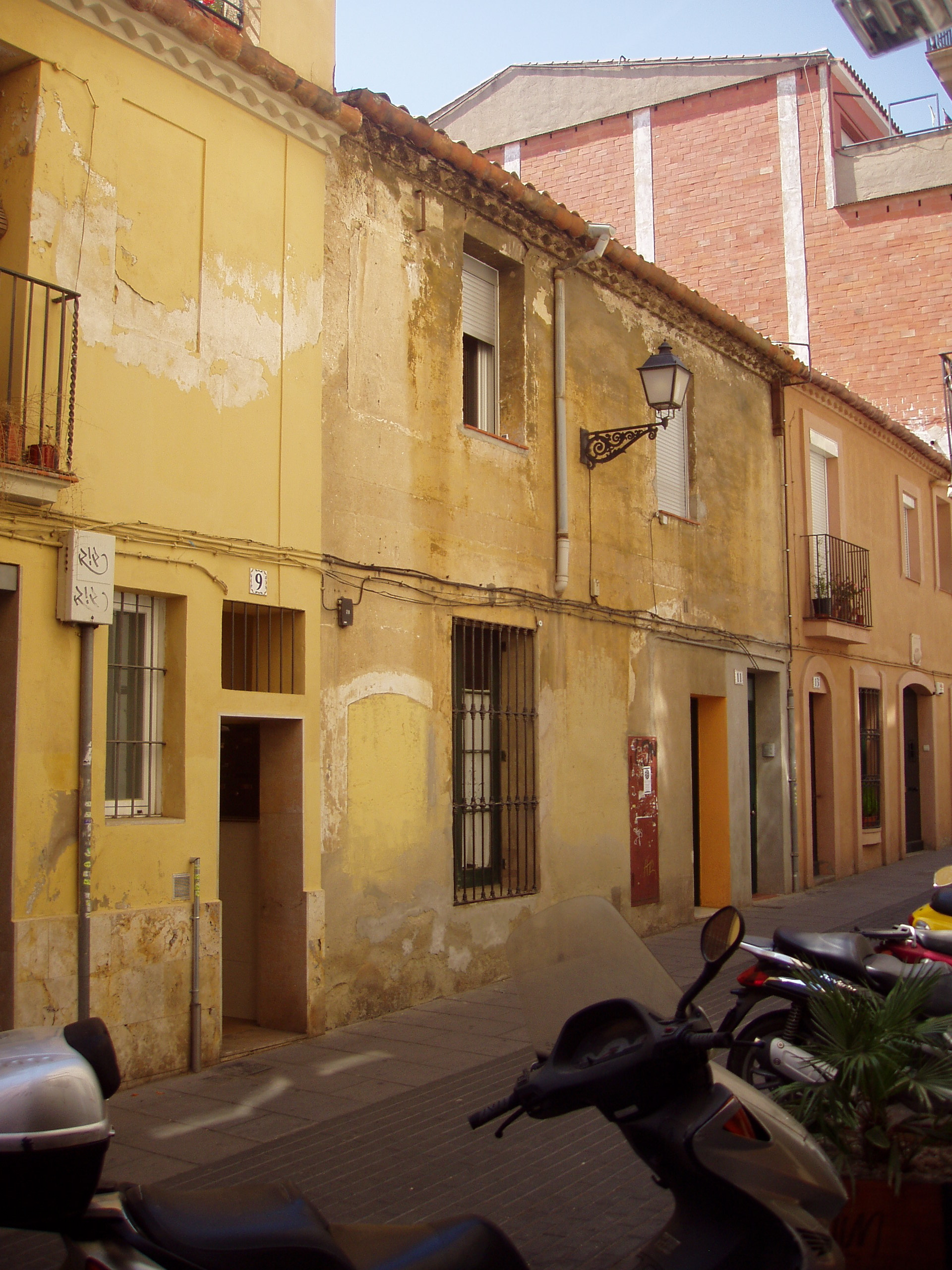 Casa d'un cos. Construcción urbana tradicional en Cataluña. Grupo de «Cases d'un Cos» en una calle del barrio de Sarriá, Barcelona.